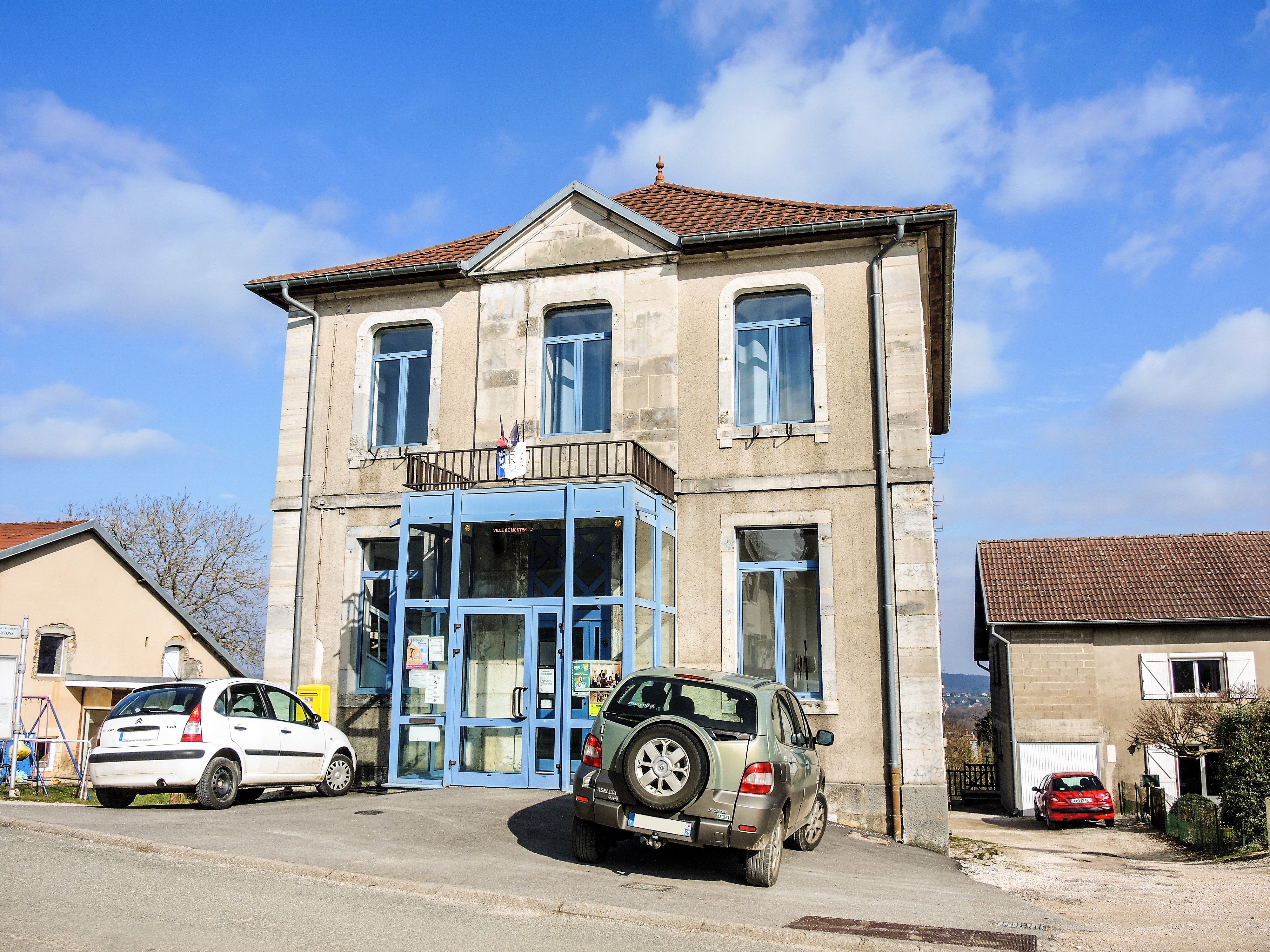 Façade de la mairie de Montenois. Doubs